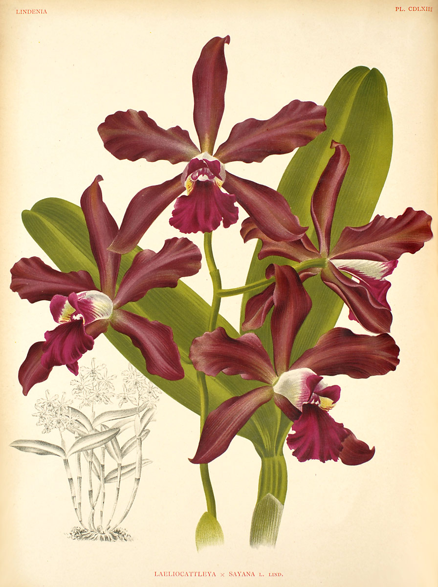 Софрокаттлея